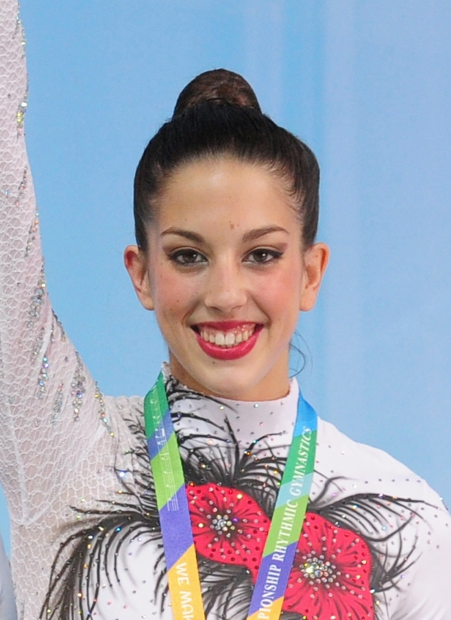 Alejandra Quereda con la medalla de bronce en el podio de la final de 3 pelotas y 2 cintas en el Campeonato Mundial de Kiev en 2013.